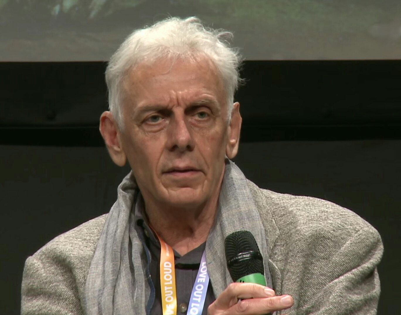 Find out more at: Das Kulturelle Gedächtnis, verstanden als generationenübergreifende, interaktionslose Kommunikation über aufgezeichnete kulturelle Äußerungen (Text, Musik, Malerei etc.), kann nur dann dauerhaft, nachvollziehbar und zuverlässig funktionieren, wenn der Kommunikationsfluss durch Gedächtnisinstitutionen organisiert wird. Gedächtnisinstitutionen pflegen das Kulturelle Gedächtnis durch den Aufbau eines Bestandes kultureller Äußerungen, ihre Bewahrung und Vermittlung an gegenwärtige und zukünftige Nutzer. Der Aufbau einer Sammlung entspringt im Analogen einer Idee, folgt einem Plan, entwickelt sich in der Geschichte, wird von Generation zu Generation weitergebaut, ist ortsgebunden, strukturiert... Ellen Euler Anne Klammt | Luciano Floridi Luca Giuliani Johannes Theurer Creative Commons Attribution-ShareAlike 3.0 Germany (CC BY-SA 3.0 DE)